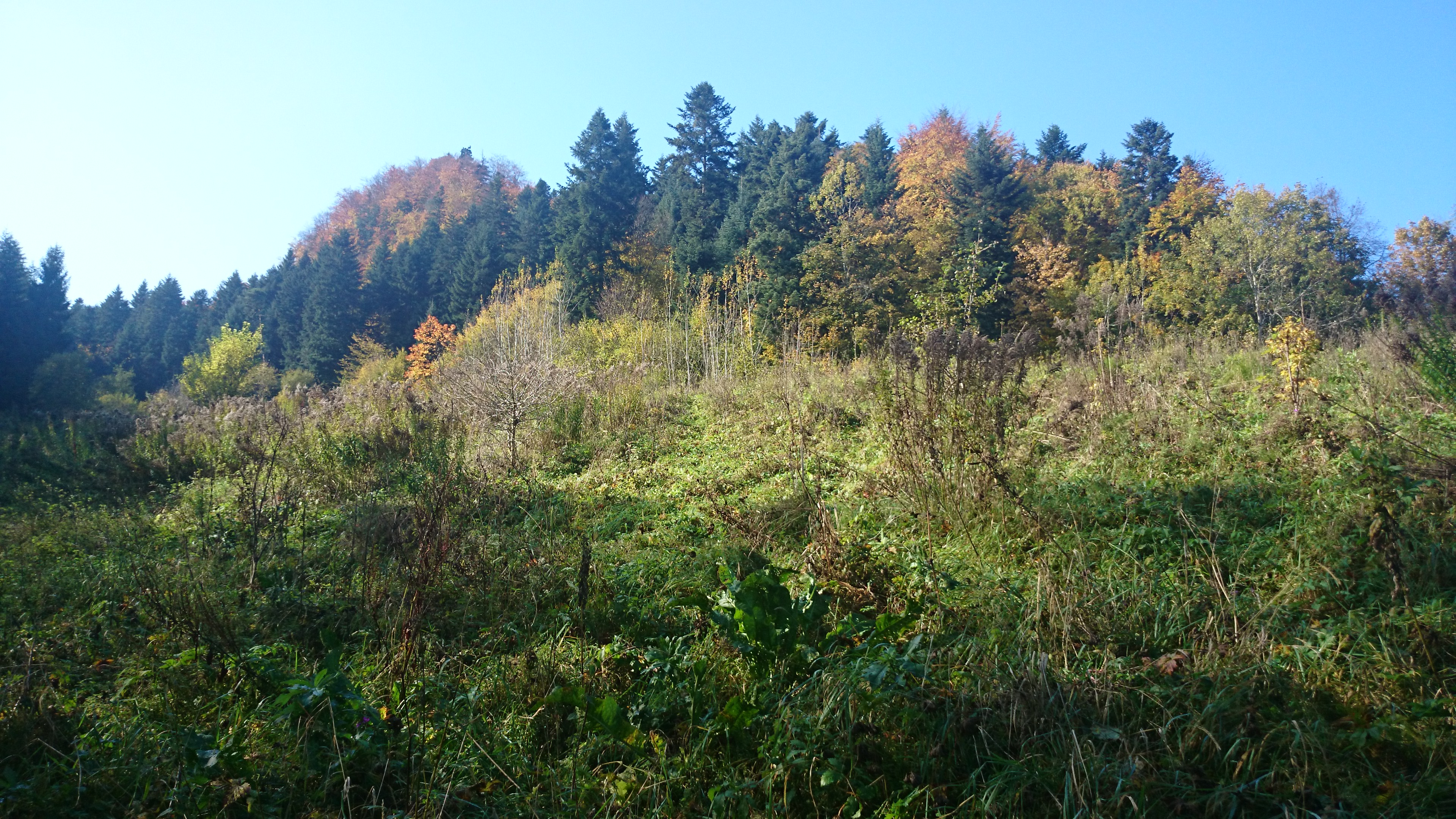 Zimna Skała od strony Ociemnego Potoku